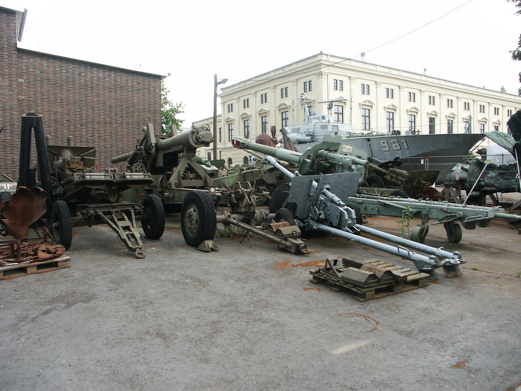 Bundeswehrmuseum Dresden mit Teilen von der NVA ZIS-3 76 mm divisional gun D-20 152 mm corps gun-howitzer